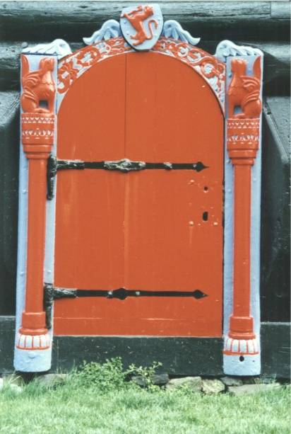 Døren ved Kongsgården i Kirkjubøur